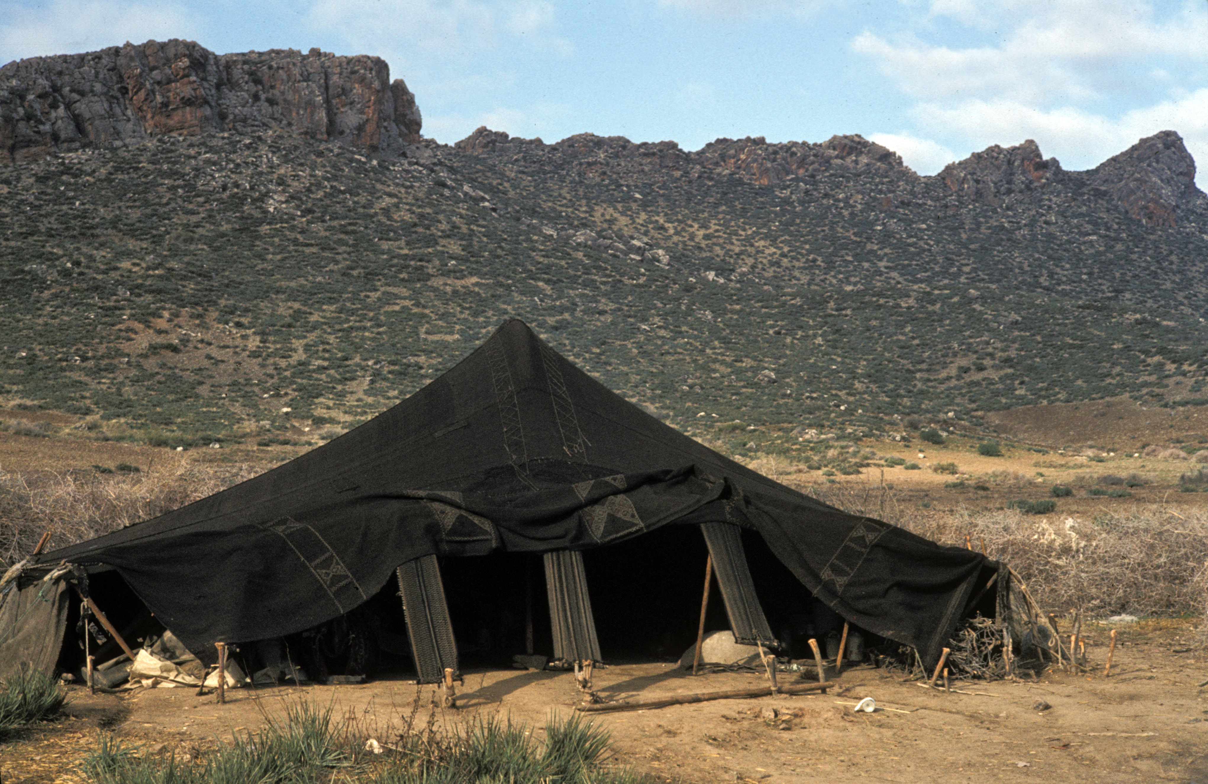 Morocco